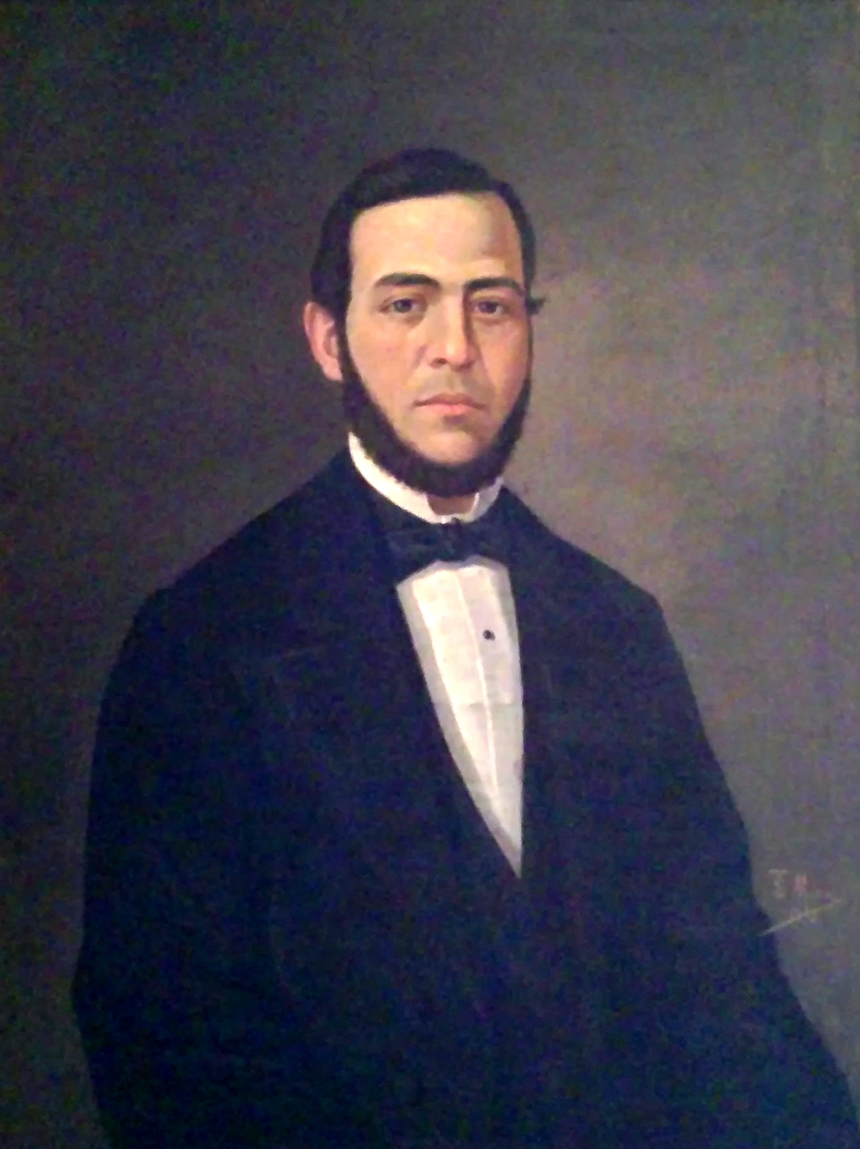 Padre de Tomás Muñoz Lucena pintado en 1878